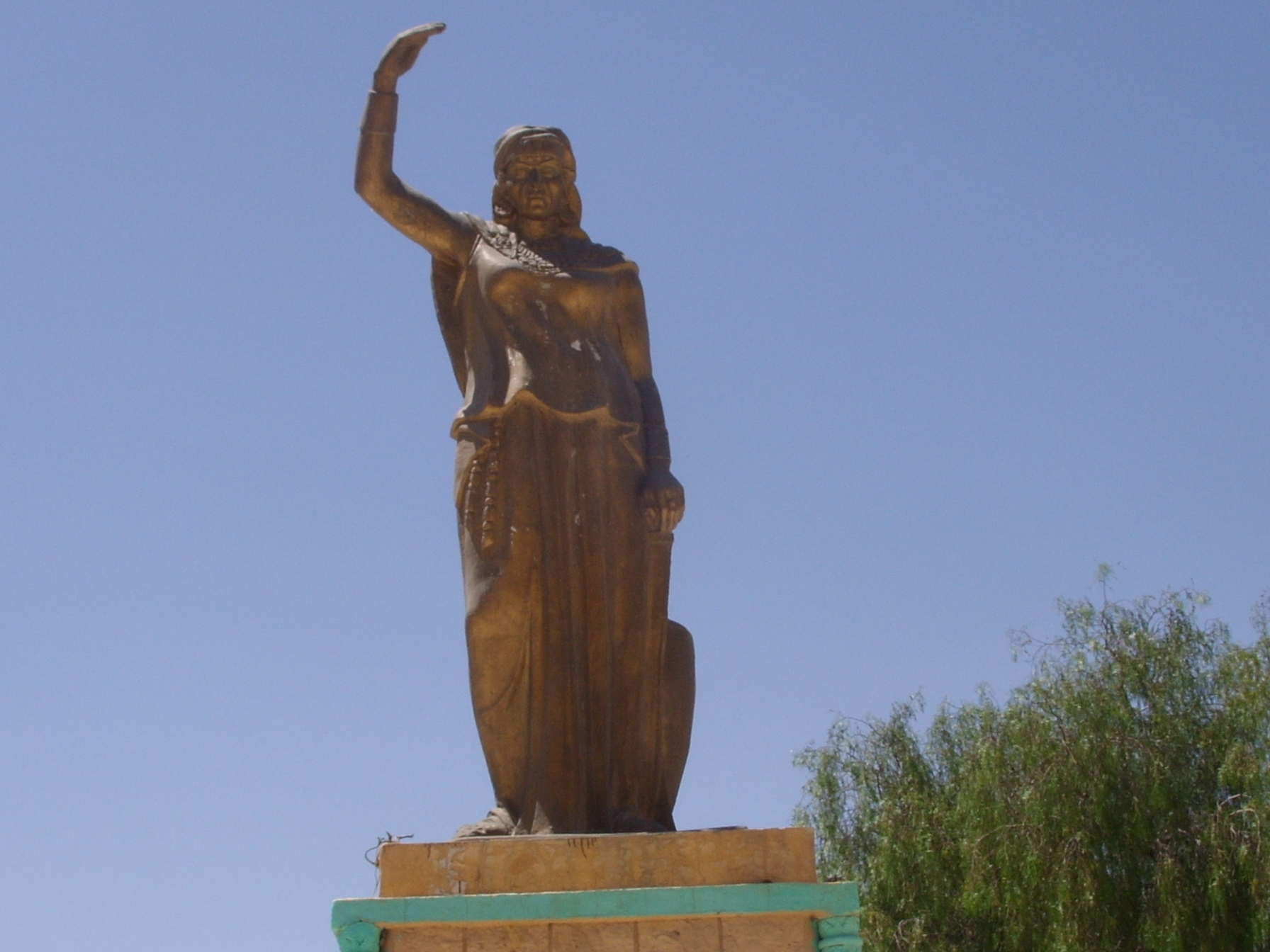 Photographie de la statue de "La Kahena" prise au centre-ville de Khenchela